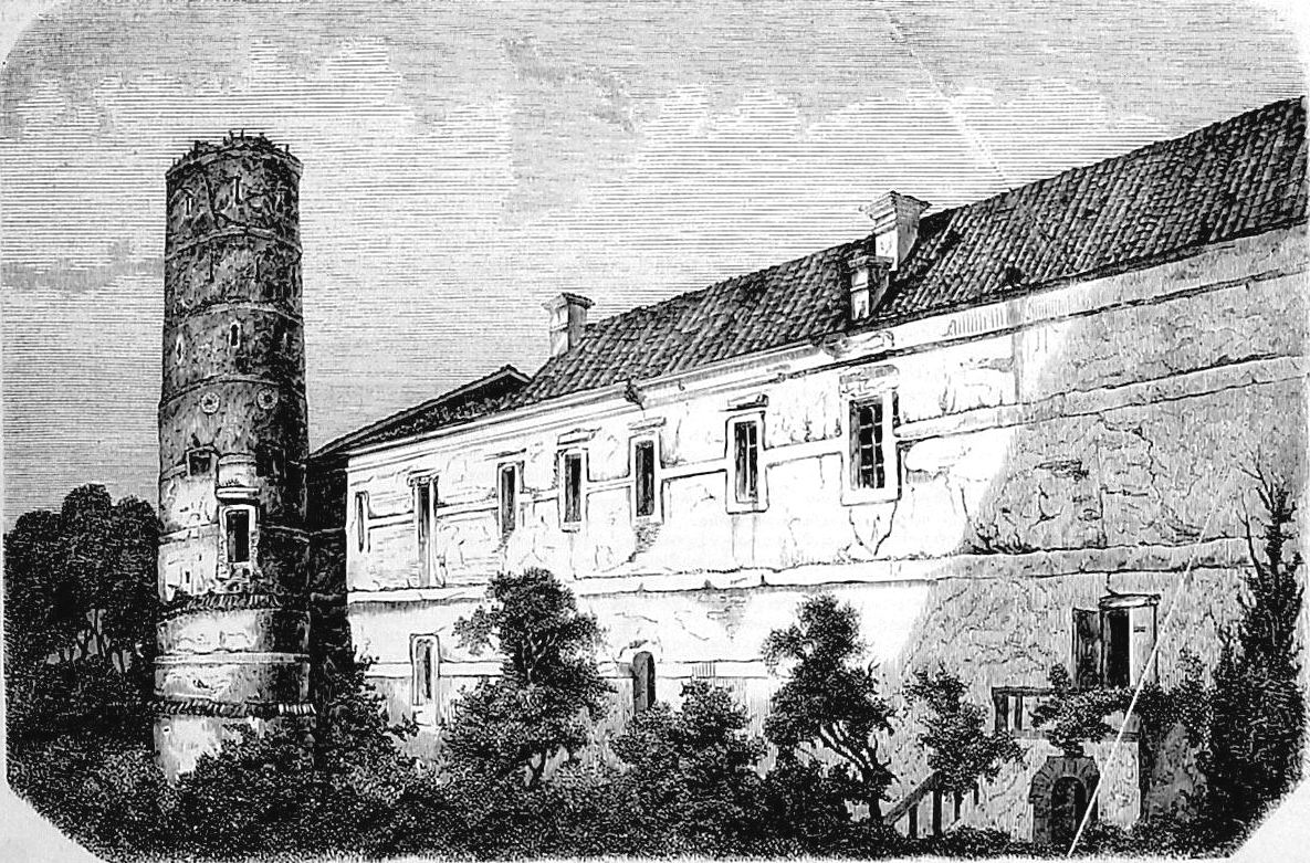 Zamek Giełgudowski nad Niemnem (pol. Poniemuń, Giełgudów, lit. Panemunė)